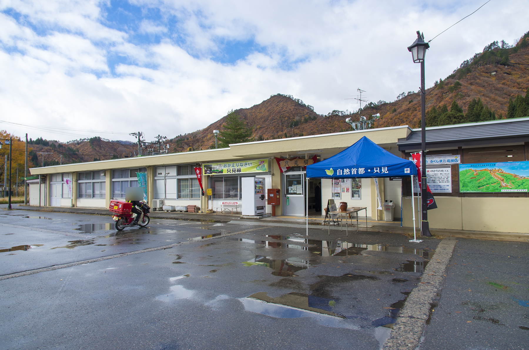 東日本旅客鉄道株式会社只見線只見駅